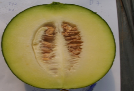 Dưa lưới Dưa lưới Thúy Phượng (mặt trước và mặt cắt) tại Khu Nông nghiệp công nghệ cao